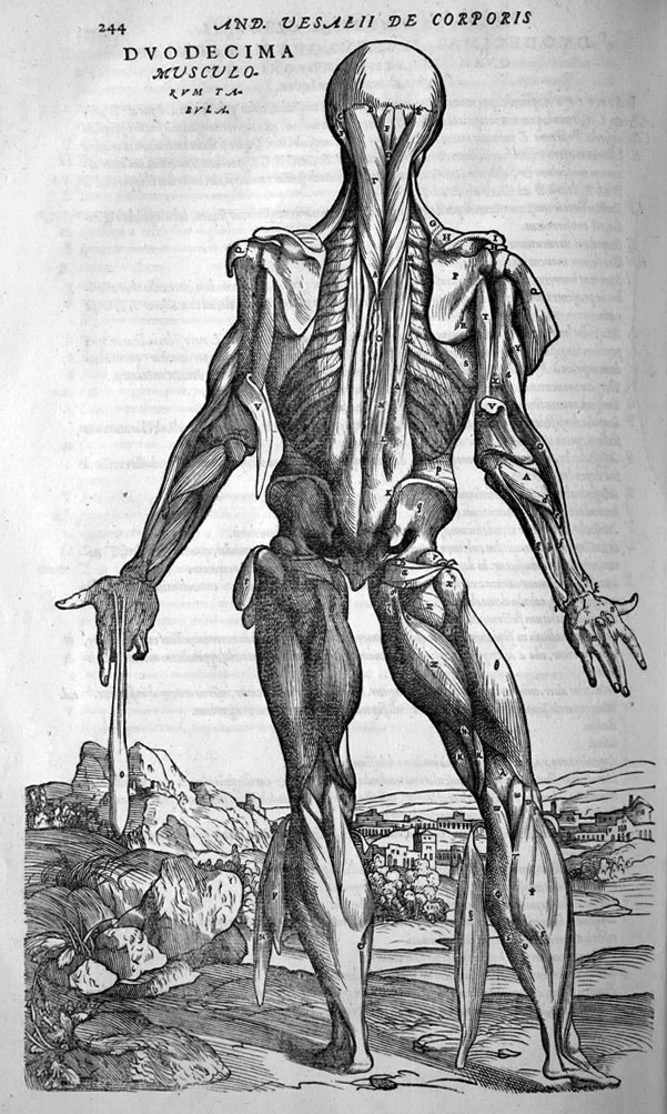 Andreas Vesalius (1514-1564): Andreae Vesalii Bruxellensis, invictissimi Caroli V. Imperatoris medici, de humani corporis fabrica libri septem, 1555.